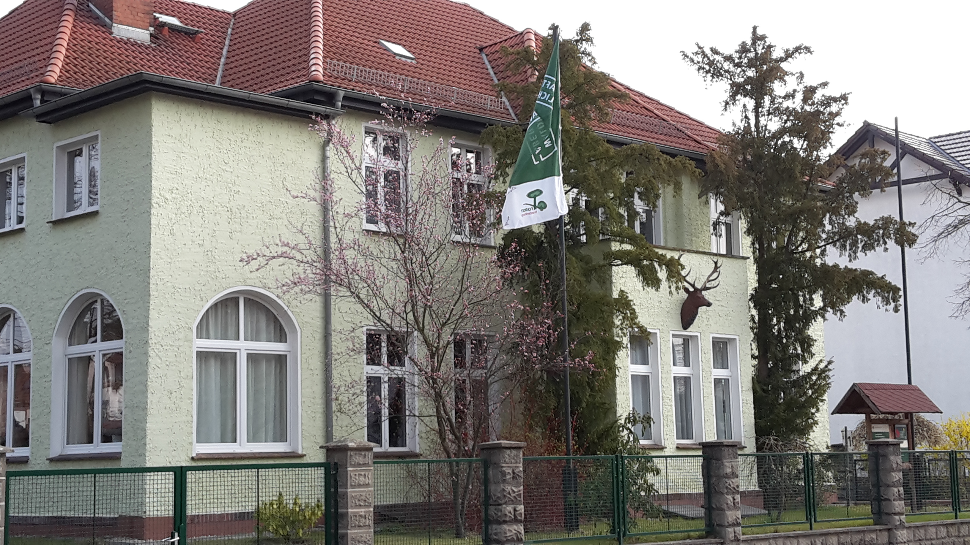 Sitz verschiedener Forstämter in Borgsdorf